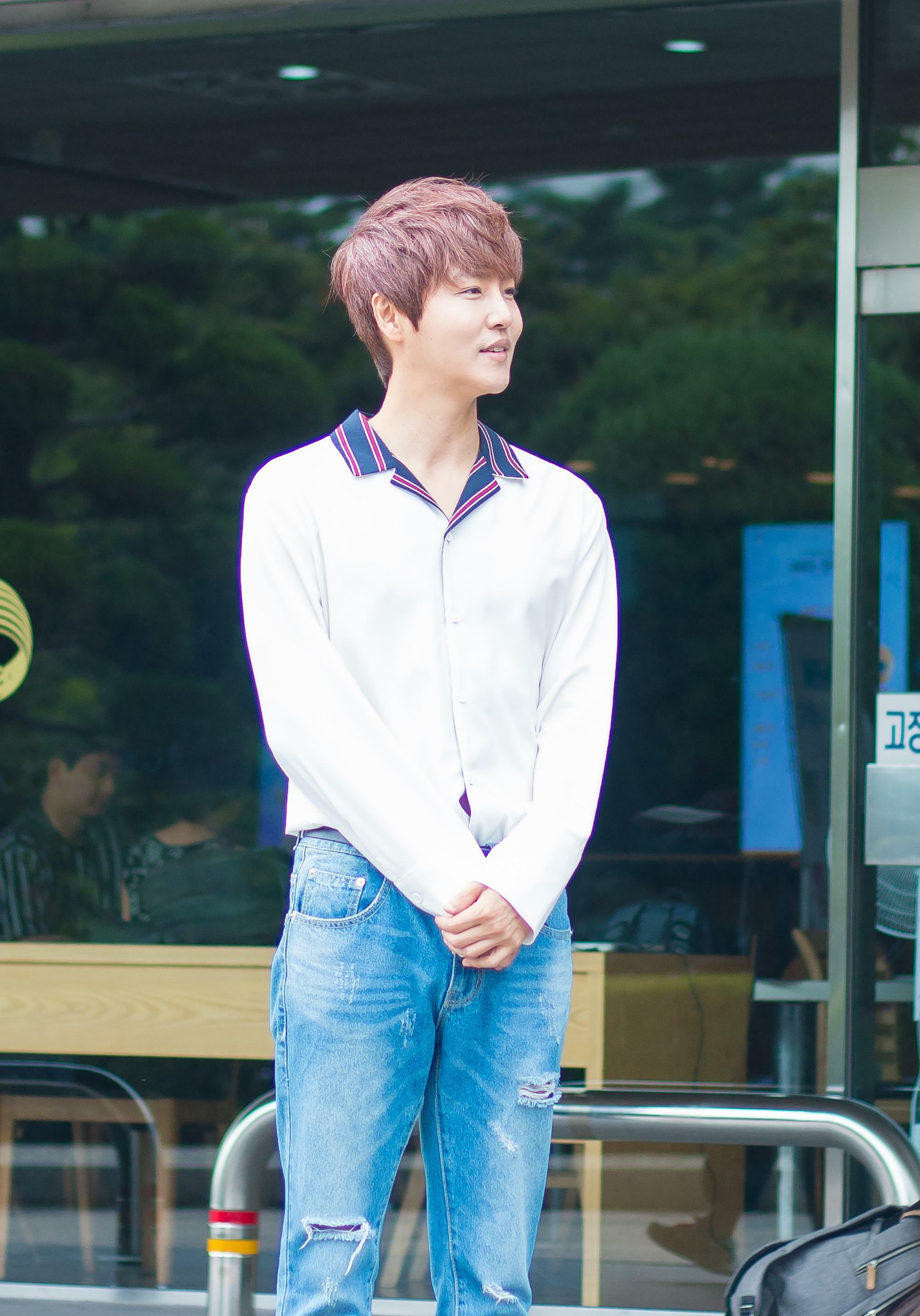 조선말: 20170819 해피투게더 출근길